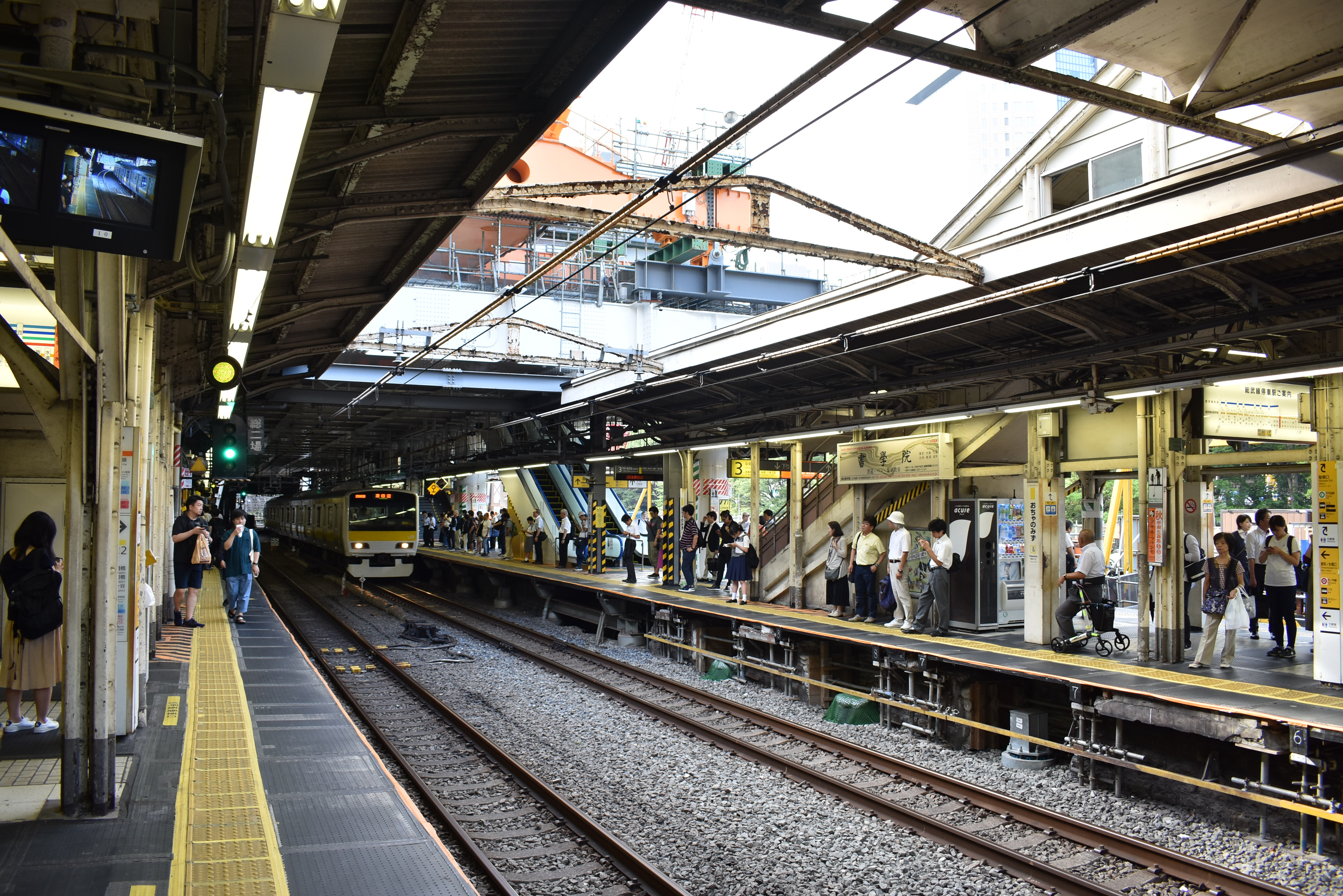 御茶ノ水駅 改良工事